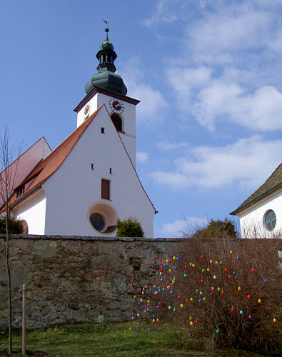 Pfarrkirche und Friedhofskapelle in Wondreb